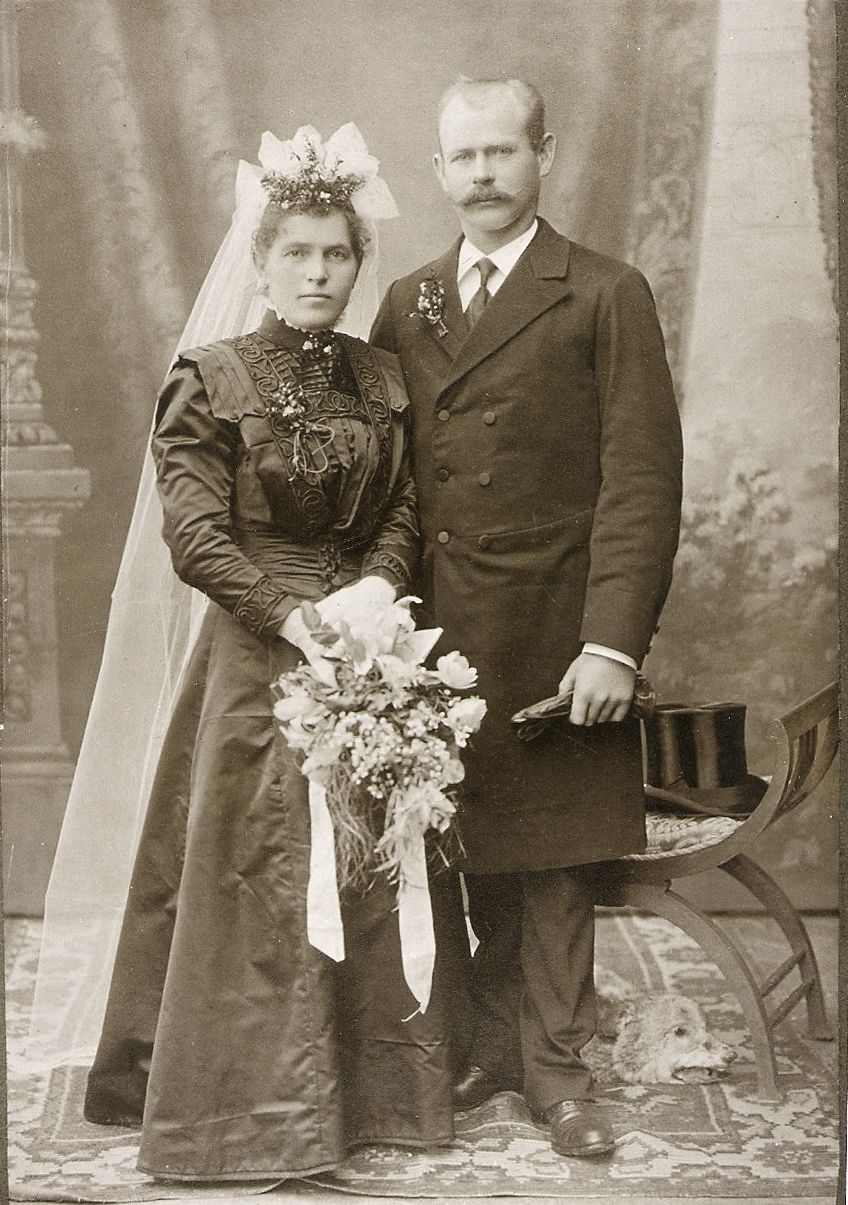 Brautpaar um 1900 in Memmingen